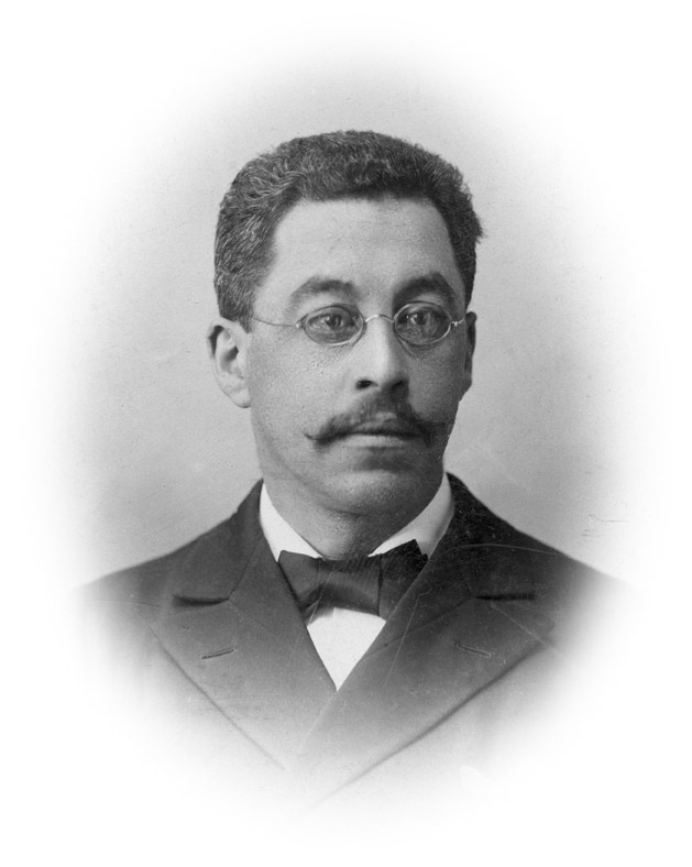 Ovale portretfoto van Arnold (Sam) Aletrino (1858-1916)